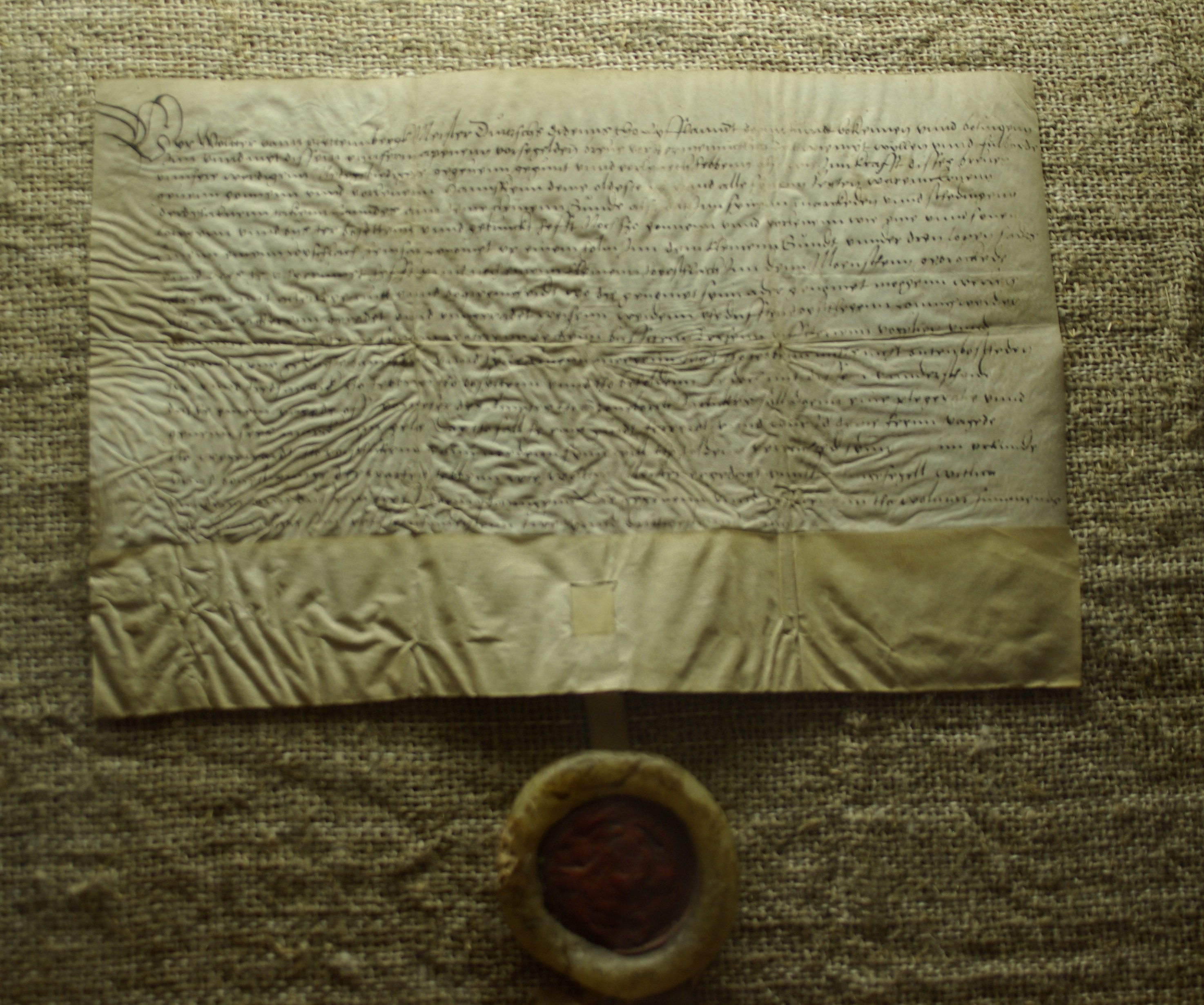 Wolter von Plettenbergi poolt 1532. aastal Koguva Hanskele antud vabaduskirja originaal. Dokument oli vaatamiseks väljas Muhu Muuseumis 22.-23. juunil 2012. Unknown